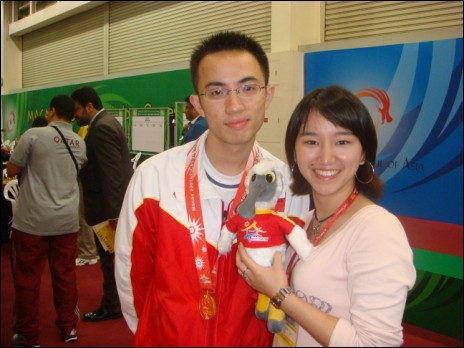 Ni Hua (left)